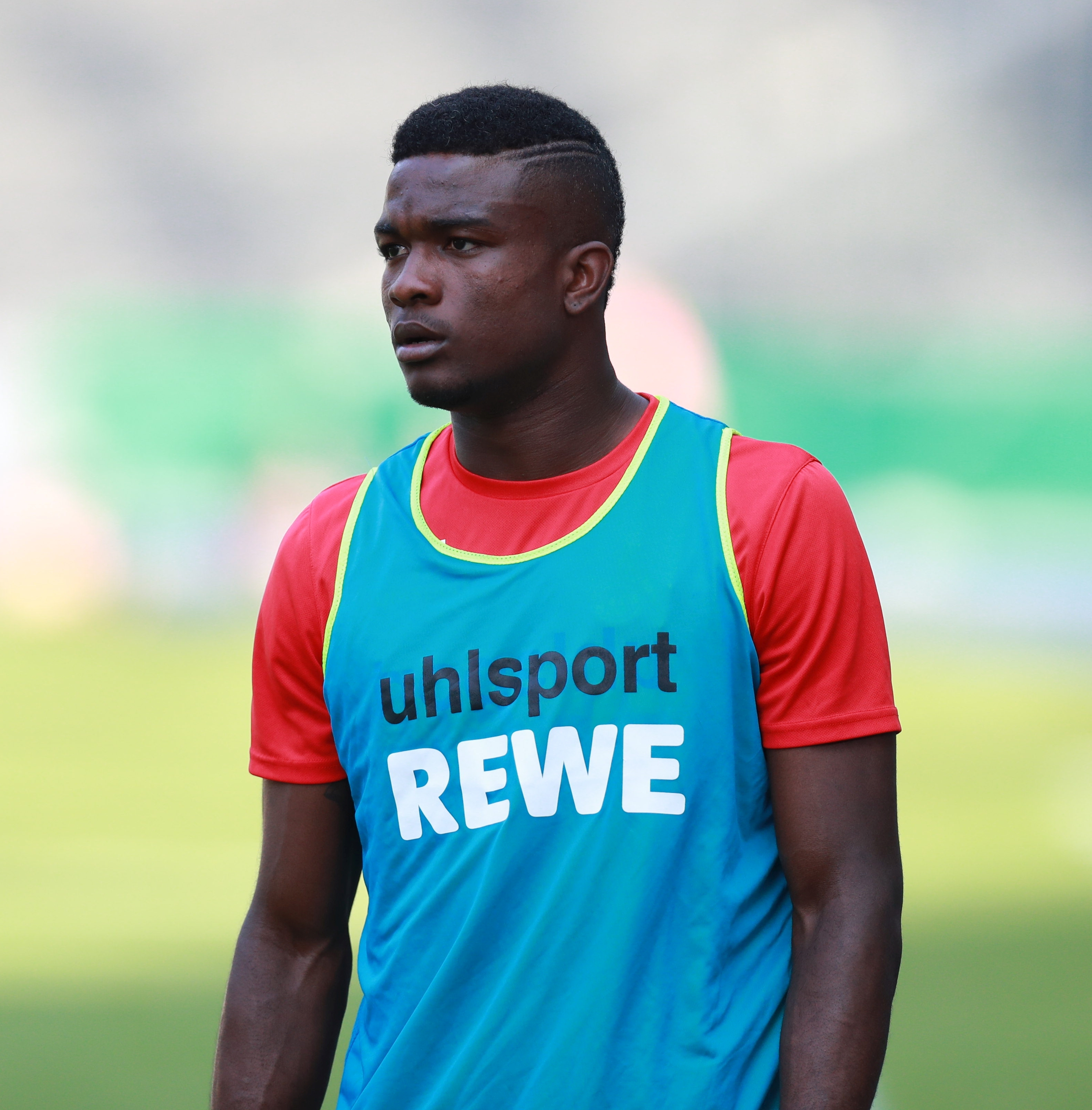 DFB-Pokal 2018/19, 1. Hauptrunde: BFC Dynamo gegen 1. FC Köln 1:9 (1:4)